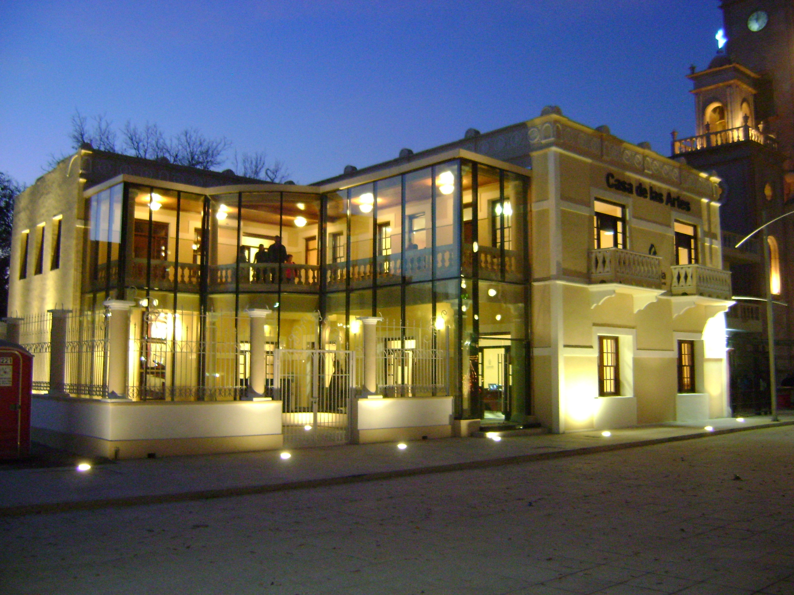 "Casa de las Artes" dentro del complejo de "La Gran Plaza" en Piedras Negras, Coahuila.